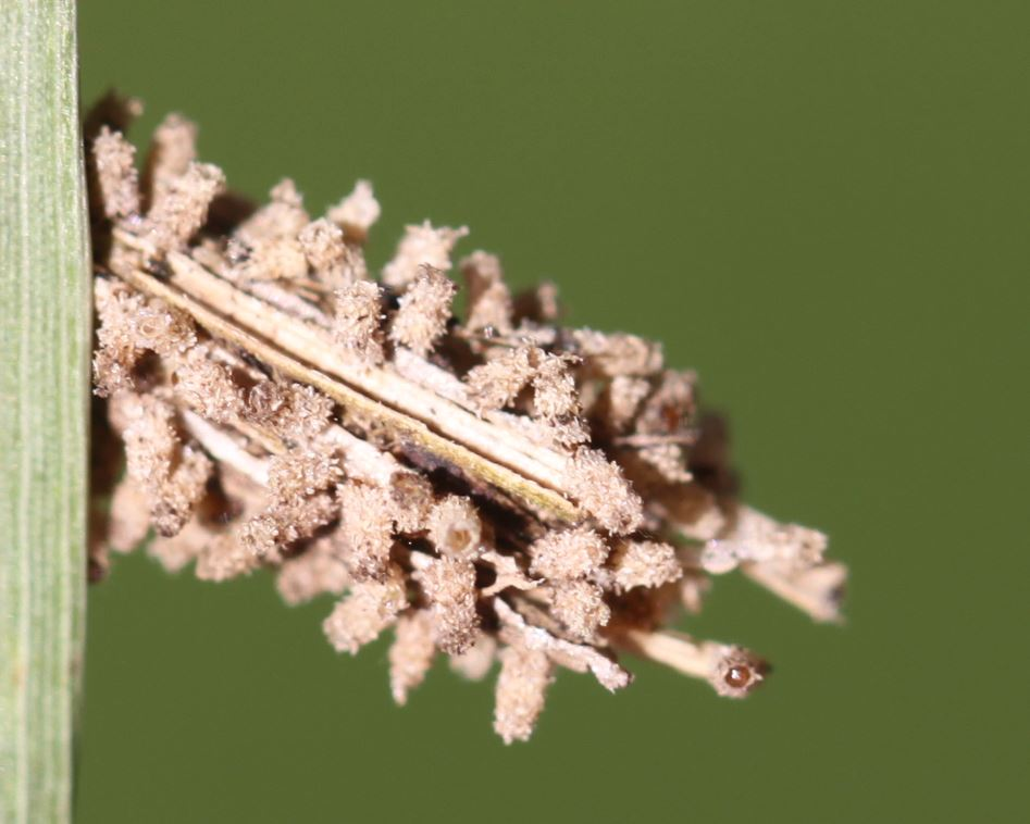 Frisch geschlüpfte Raupen des Kleinen Rauch-Sackträgers (Psyche casta) am Sack ihrer Mutter, am 3. Juni 2018, Sack an einem Grashalm in der Schwetzinger Hardt gefunden